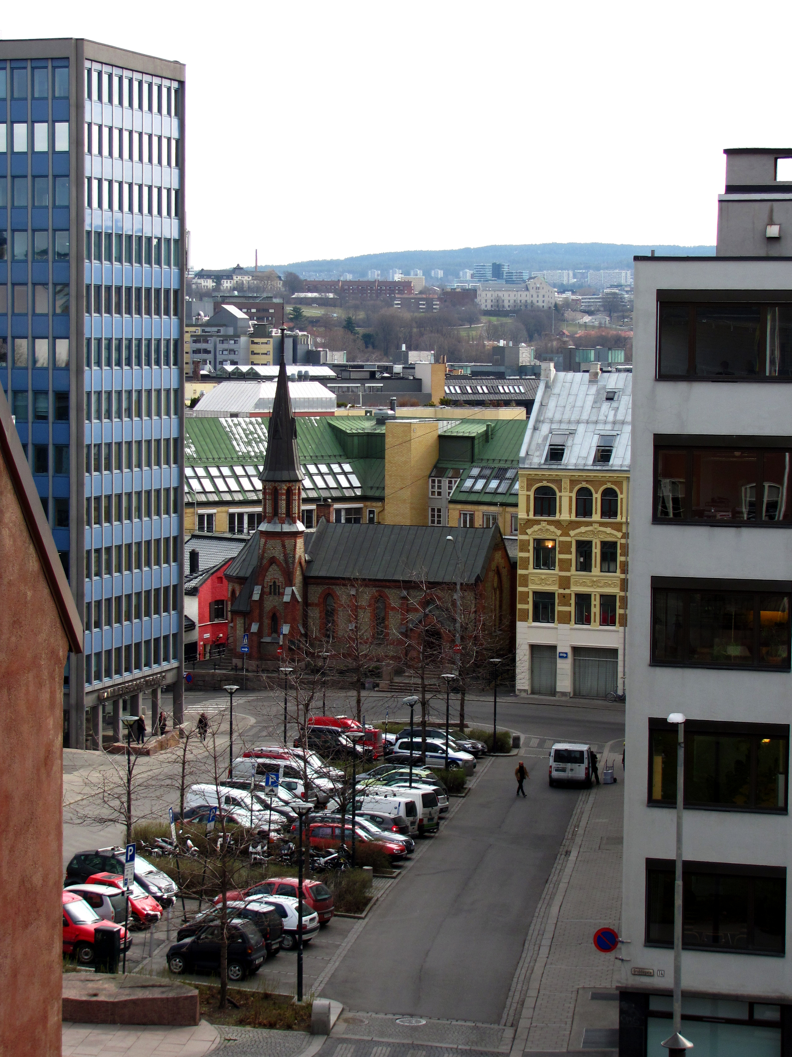 Hammersborg torg mellom Møllergata og Grubbegata på St. Hanshaugen i Oslo, sett fra Grubbegata. Til venstre nr 3 oppført i 1965 (2013: Kirkens bymisjon). Møllergata med St. Edmund's anglican church (30) og Maran Ata-tempelet (28), Grubbegata 14 til høyre.